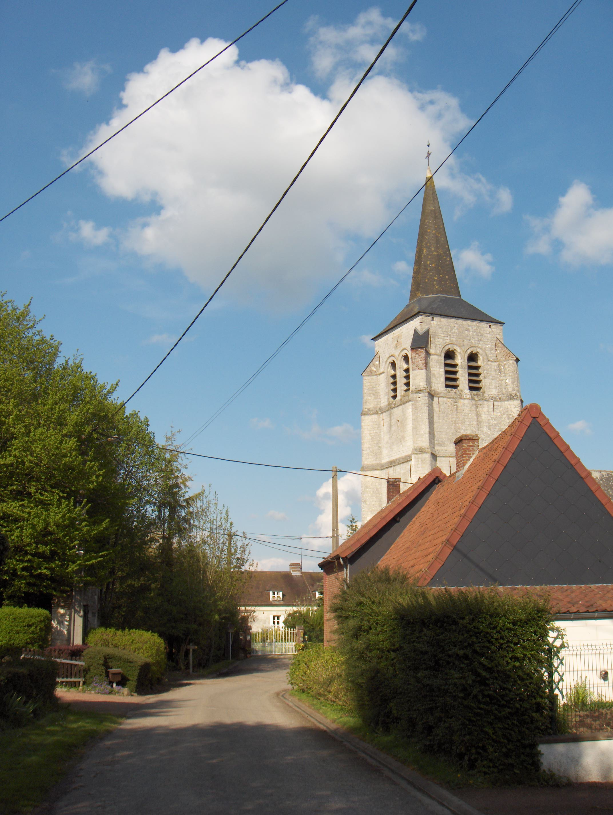 Fosseux (dépt. Pas-de-Calais, France), élgise Saint-Nicolas (tour du XVIIe siècle)